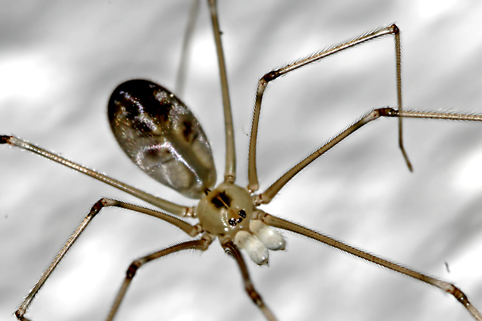 Zitterspinne (Pholcidae), aus eigener Kellerzucht